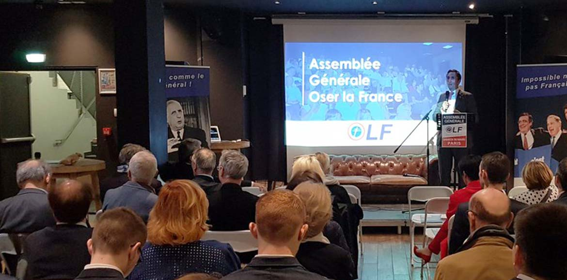 Assemblée générale d'Oser la France en mars 2019. Julien Aubert (LR) est au micro.